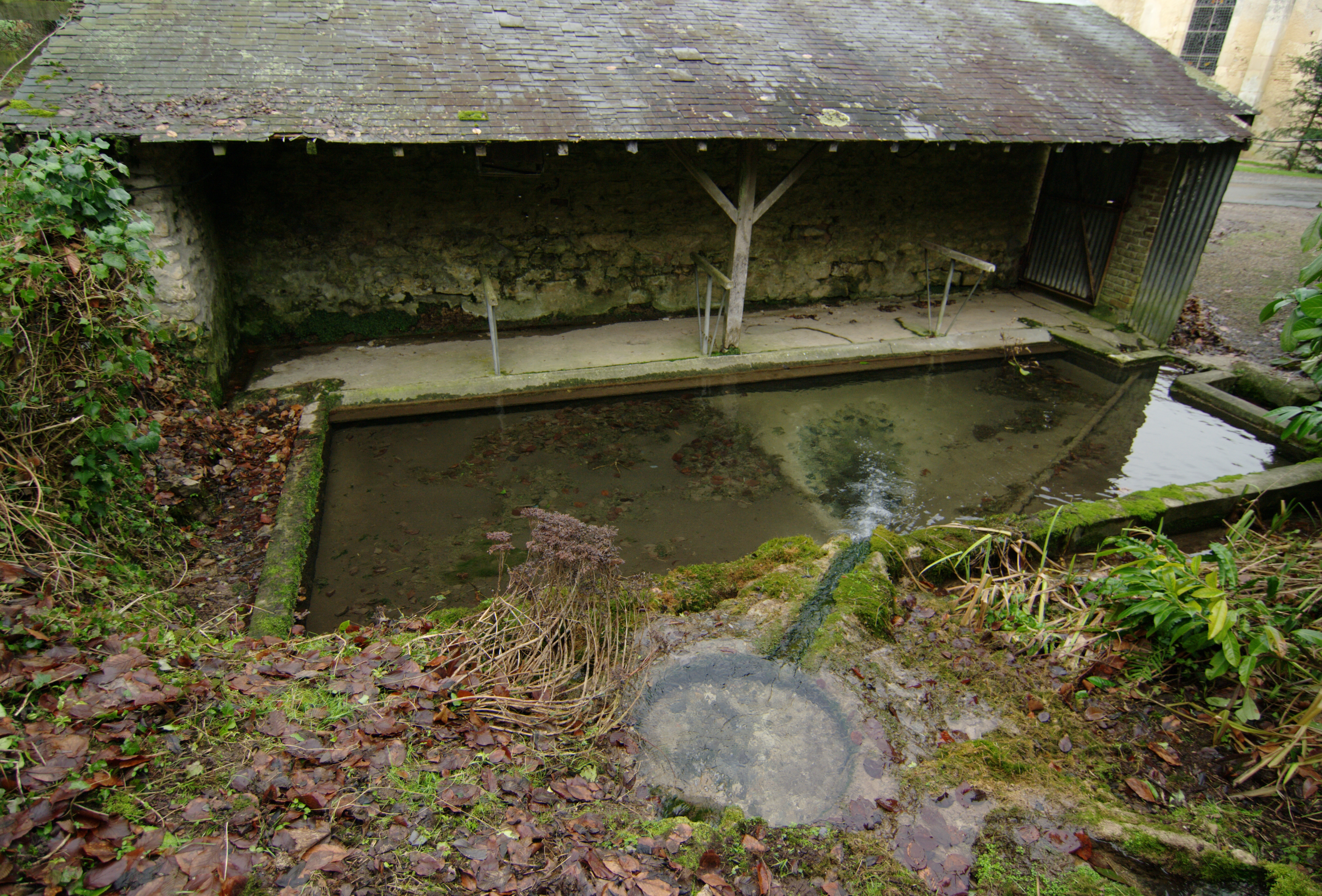 Le lavoir de Habloville (Orne) alimenté par une source, point de départ de la rivière La Baize, affluent de l'Orne.